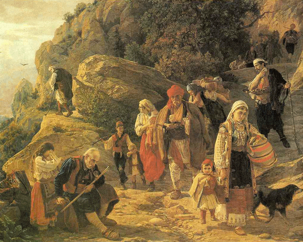 Херцеговачки бегунци, рад Уроша Предића из 1889. године